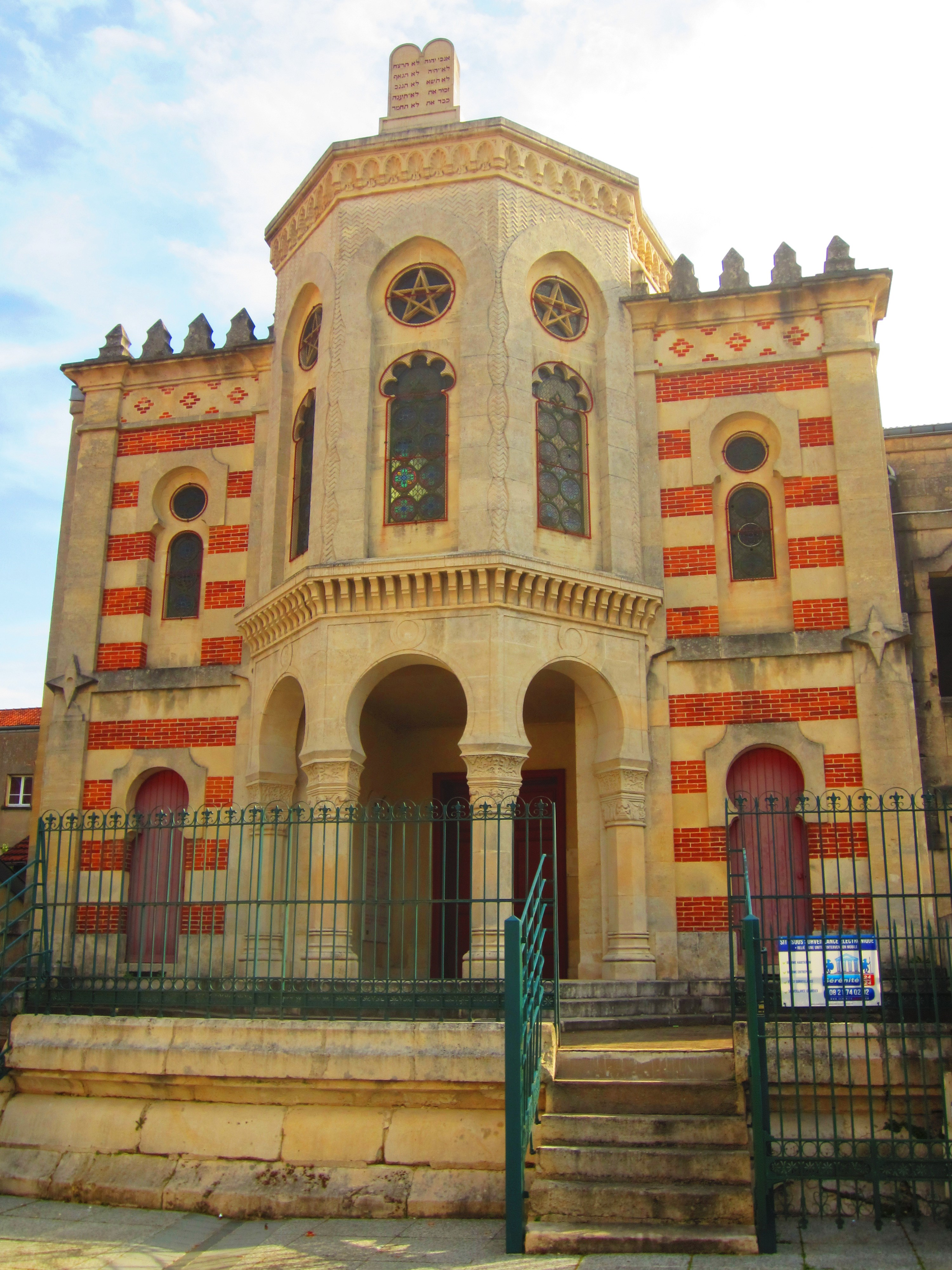 Synagogue Verdun